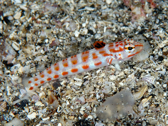 ハワイトラギス Parapercis schauinslandi